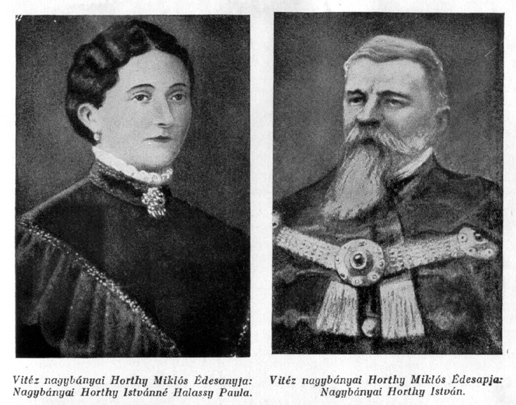 Vater und Mutter von Horthy Miklós